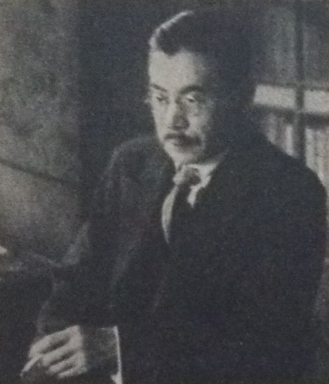 登張竹風